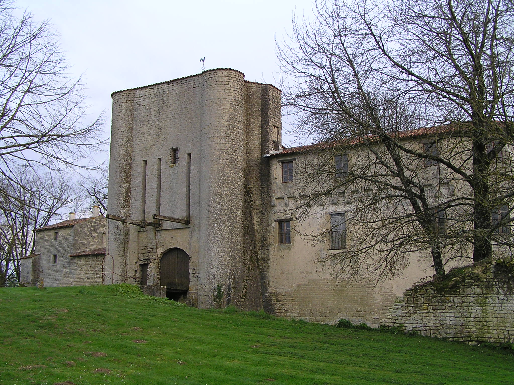 château de villeneuve la Comtesse